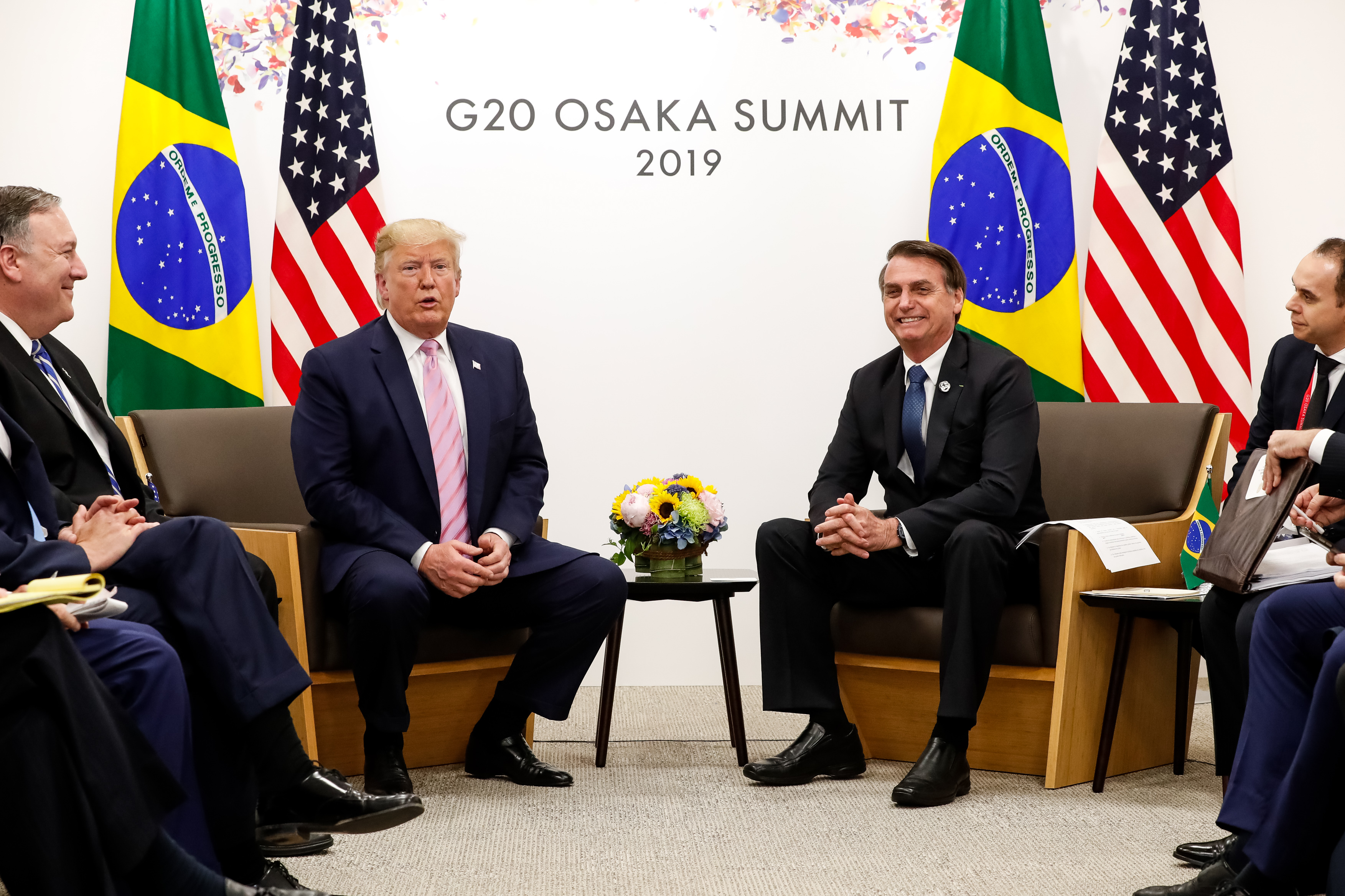 (Osaka - Japão, 28/06/2019) Presidente da República, Jair Bolsonaro, durante Reunião bilateral com o senhor Donald J. Trump, Presidente dos Estados Unidos da América. Foto: Alan Santos/PR